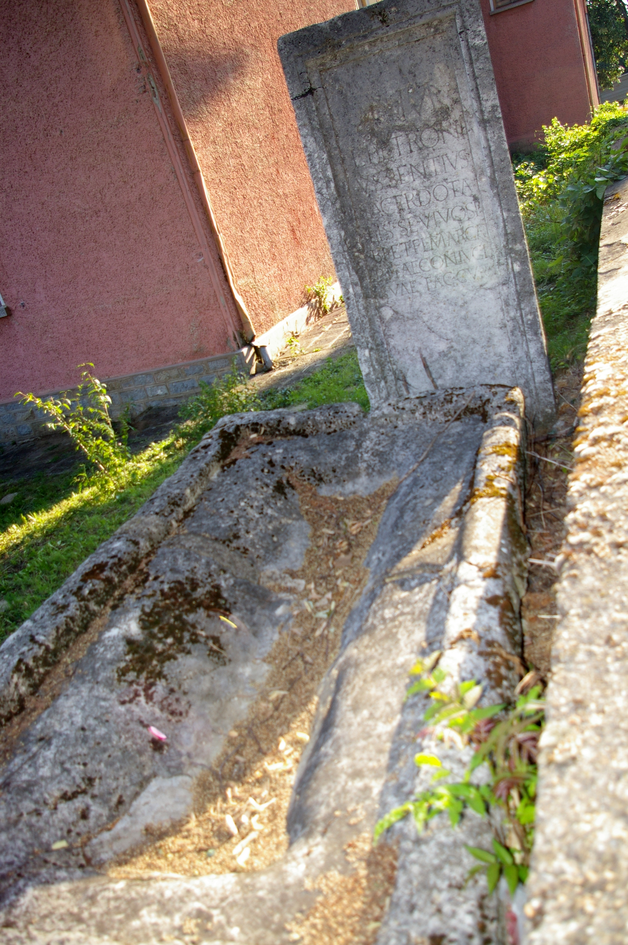 римска надгробна плоча и саркофаг, Вишовград